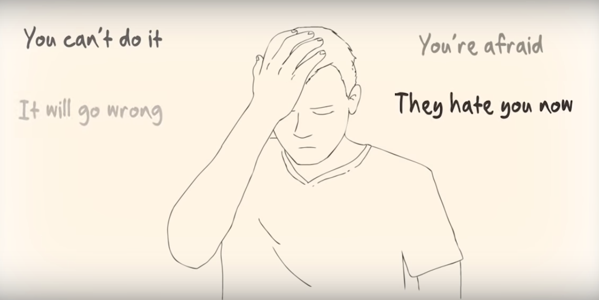 При ПТСР часто наблюдаются негативные, осуждающие мысли по поводу самого себя